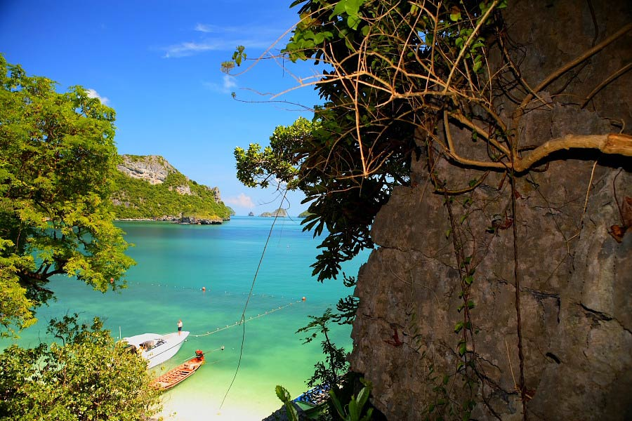 Парк Анг Тонг